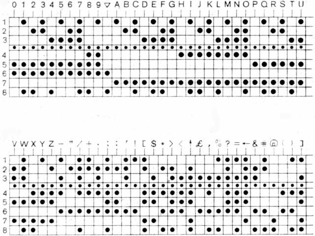 Taśma 8-ścieżkowa z kodem stosowanym w komputerach Odra-1300